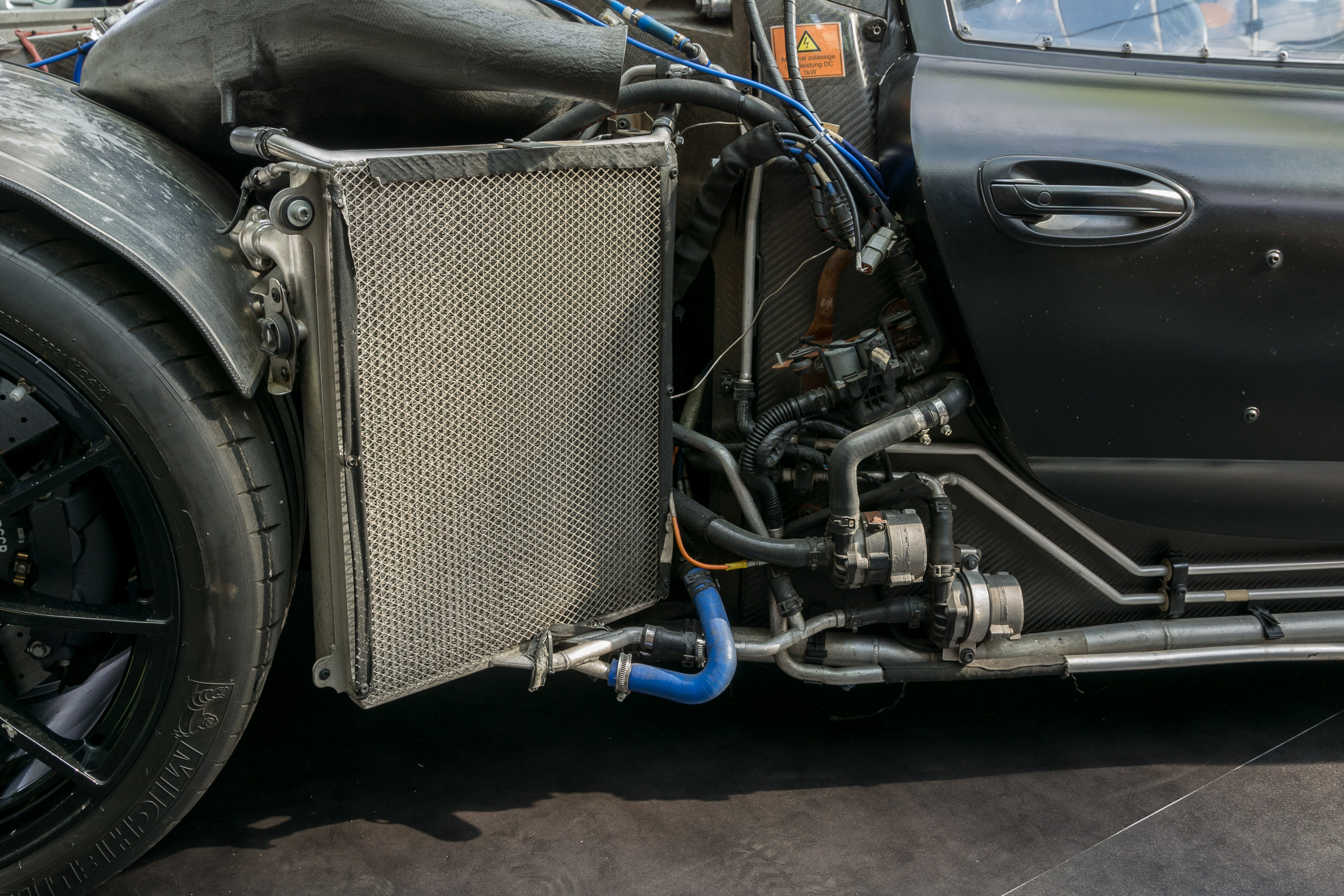 Teile des Kühlsystems an einem Versuchsträger des Porsche 918 Spyder (rechter Wärmetauscher, elektrische Kühlmittelpumpen, Umschaltventil).